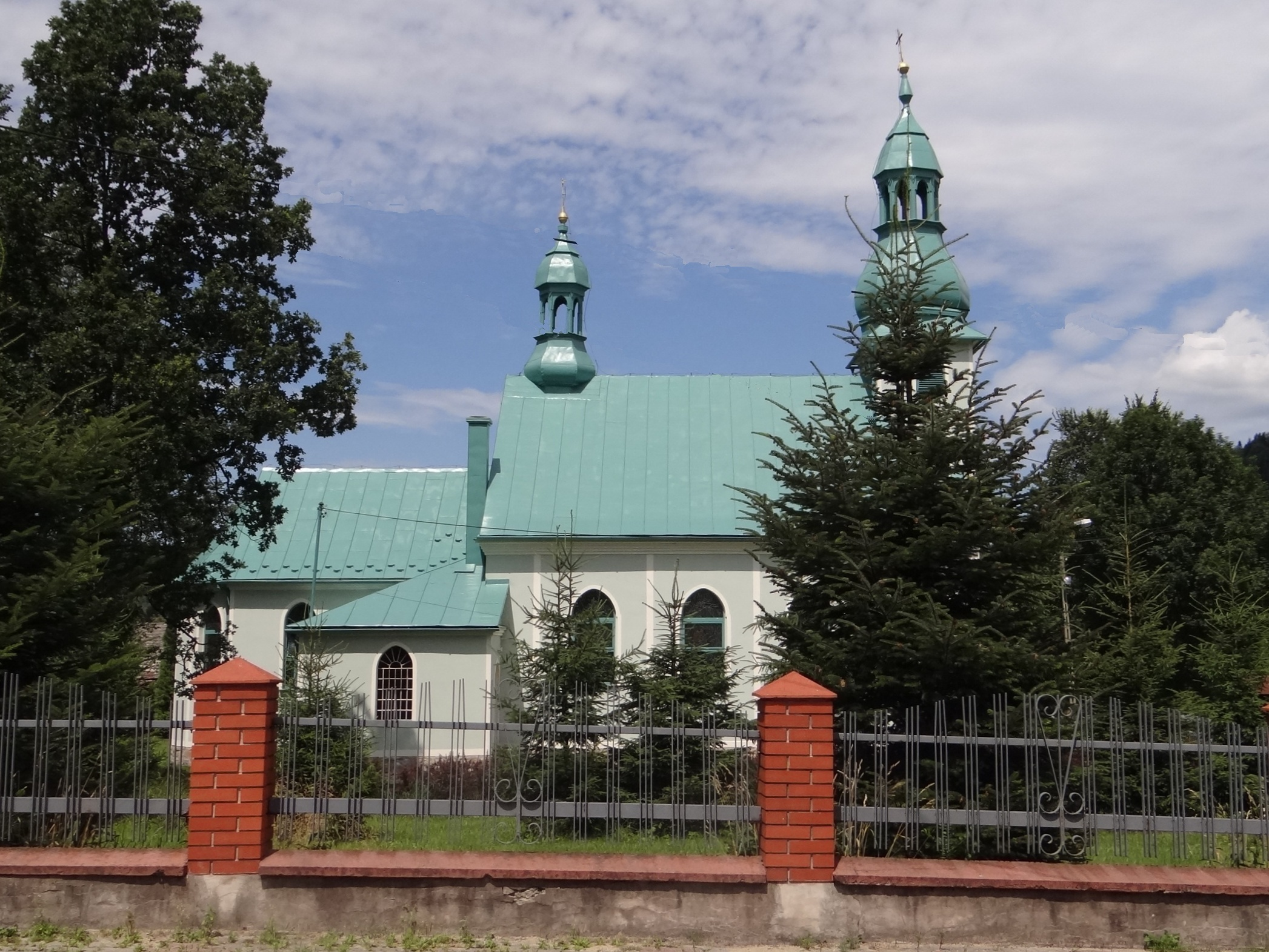 Krzyżowa, kościół